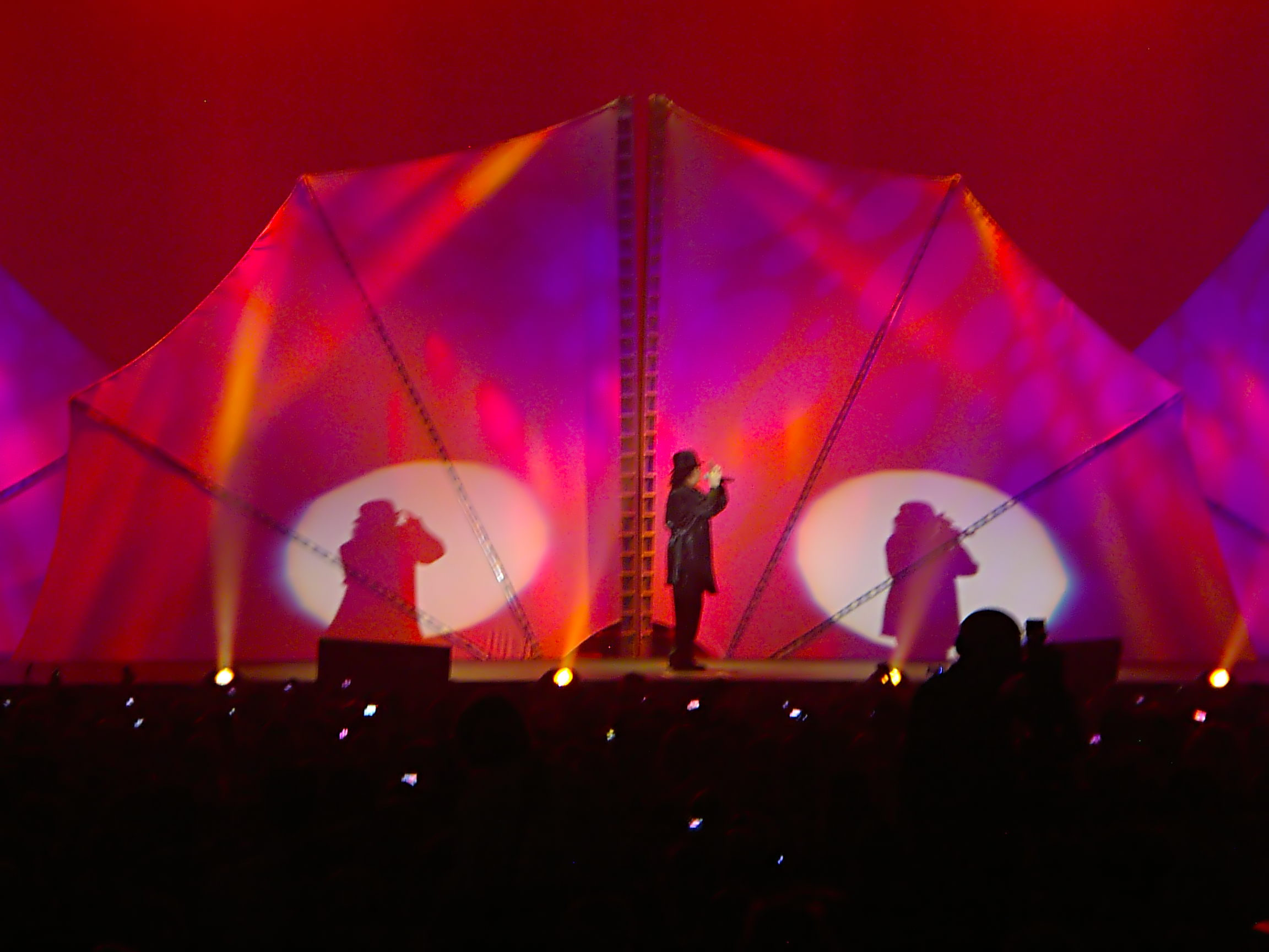 Renato Zerp in un concerto a Torino durante l'esecuzione del brano Vivo